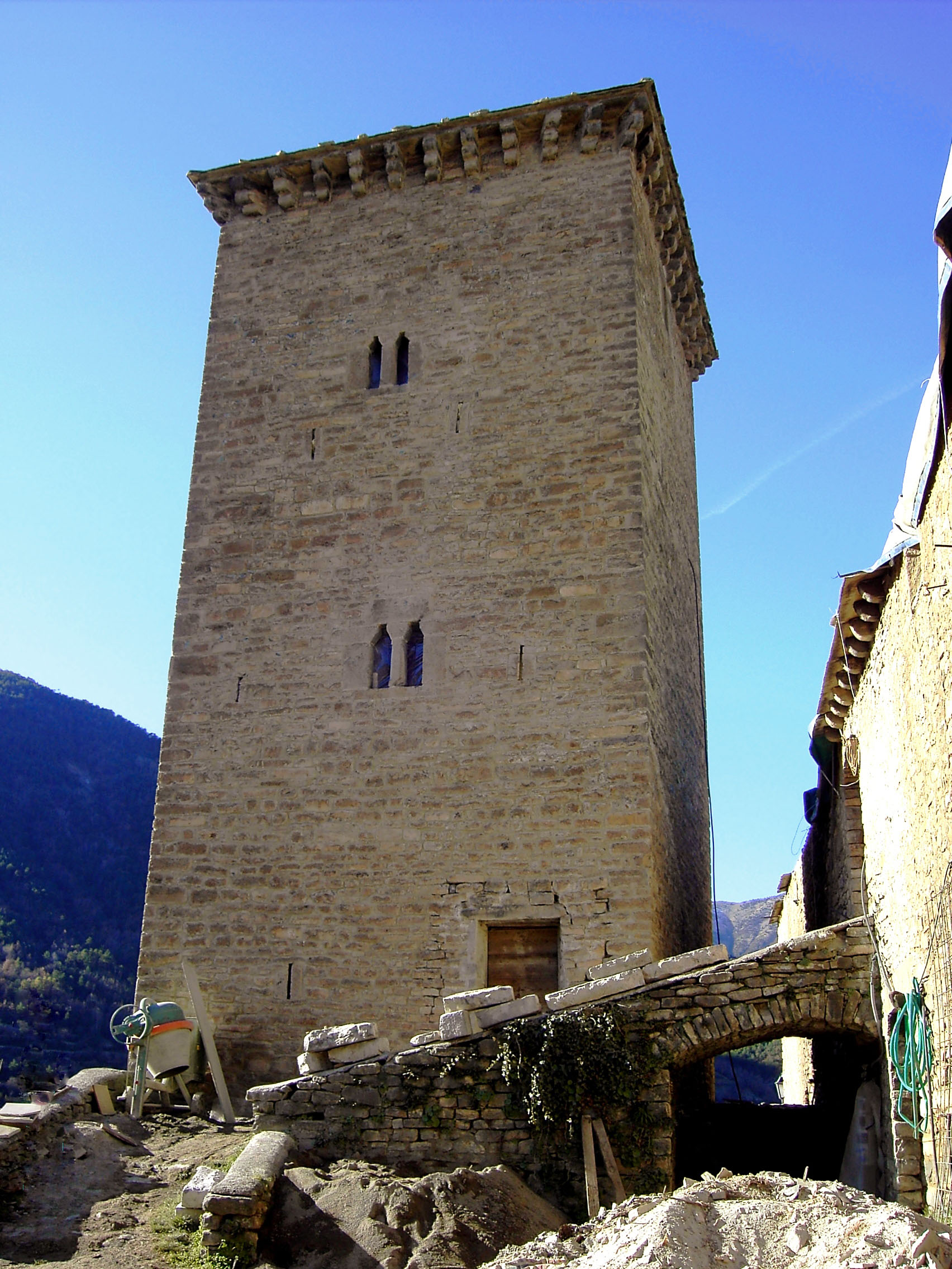 La llamada Torre dera Foz d'Escala, atalaya defensiva del siglo XVI que se encuentra en Oto, en el municipio oscense de Broto.